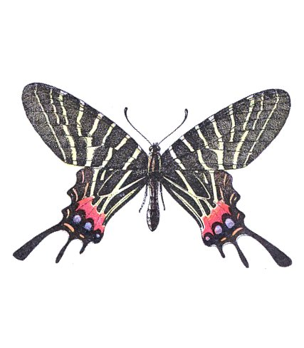 Bhutanitis